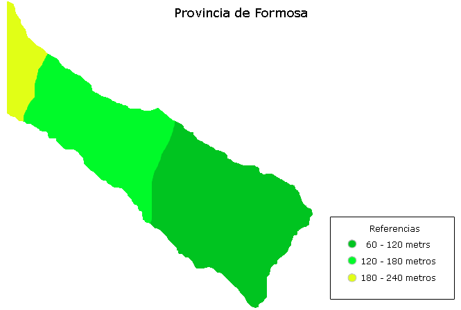 Relieve de la Provincia de Formosa